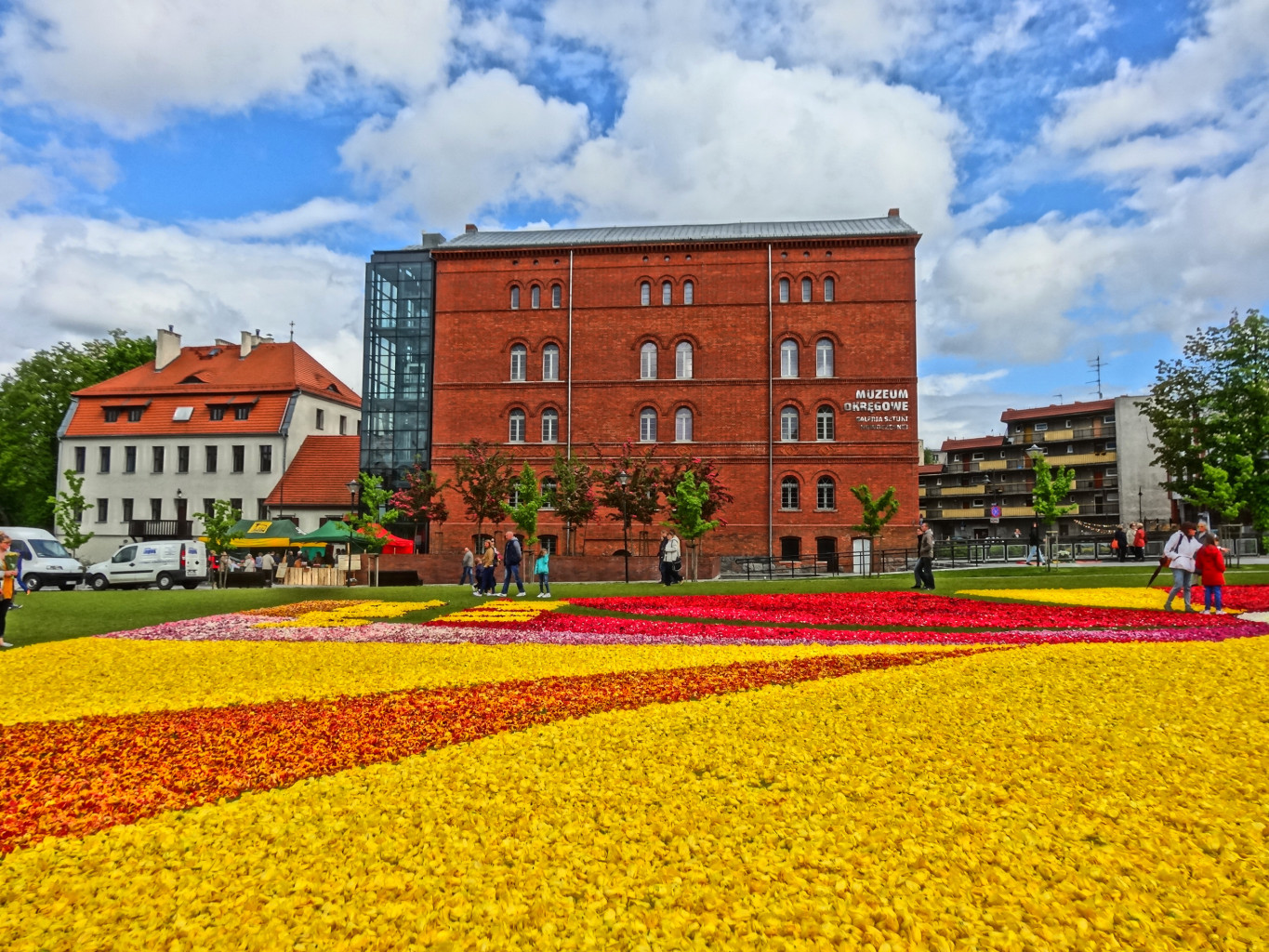 Dywany kwiatowe na Wyspie Młyńskiej w Bydgoszczy